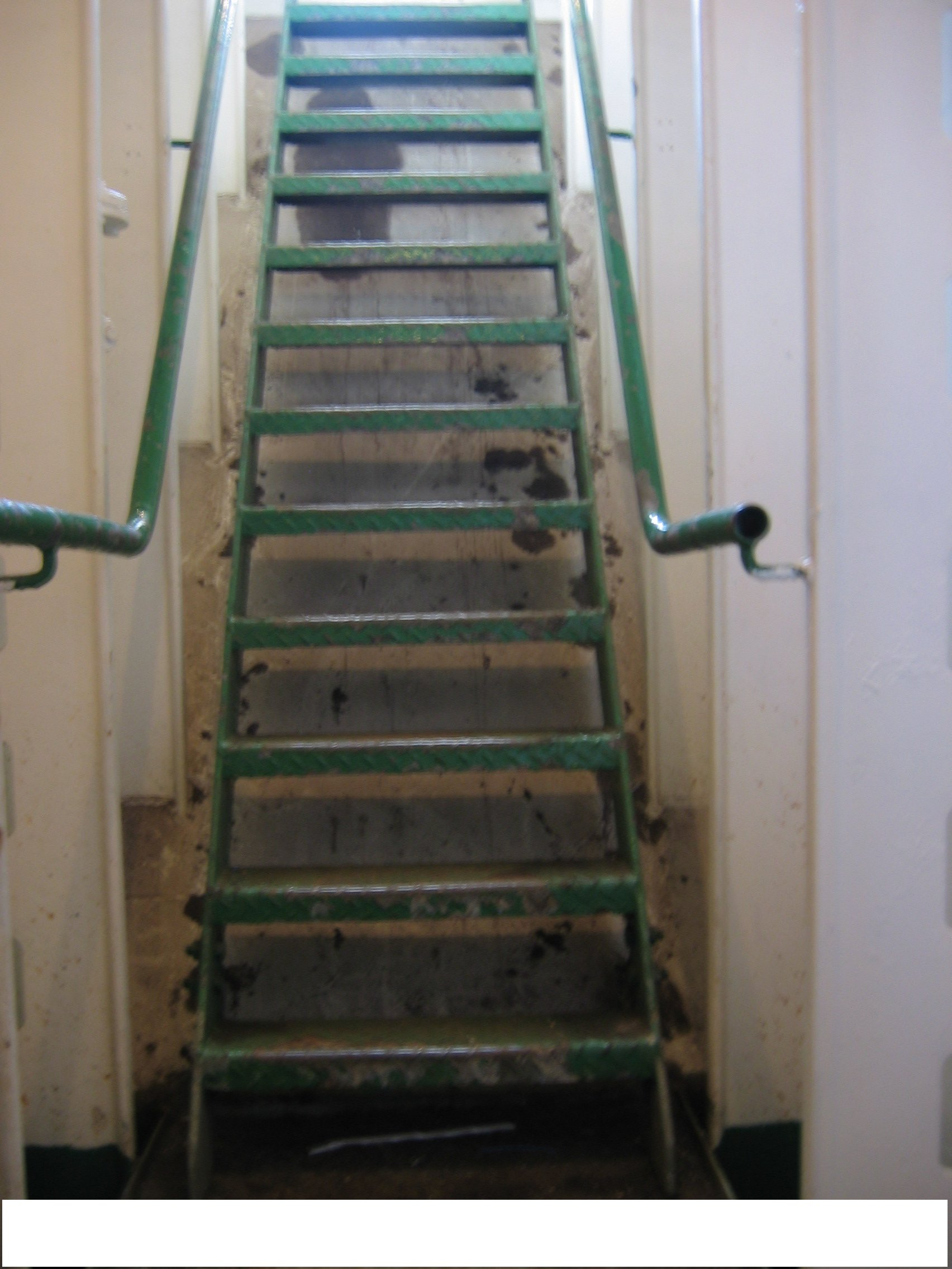 Zejściówka na drobnicowcu z lat 60-tych